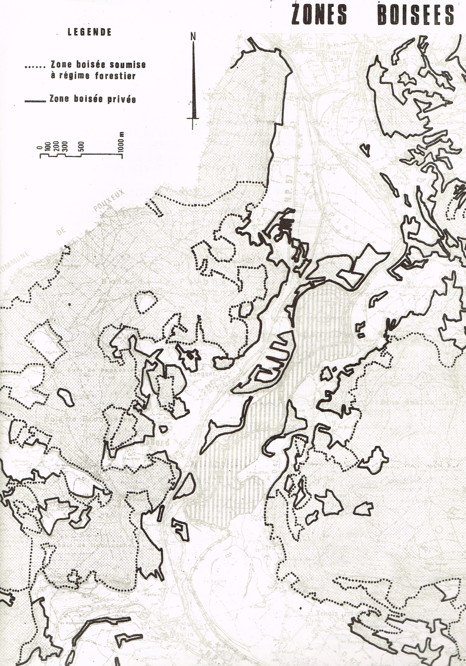 Département des Vosges, « Plan d’eau de Noirgueux », Site de plan d'eau de Remiremont, Reconnaissances 1969, Rapport de synthèse. A la suite du rapport technique sommaire du 4 janvier 1963 d'André Gravier, ingénieur conseil des études ont été réalisées par l’Agence financière de bassin Rhin-Meuse en janvier 1970, lesquelles seront complétées par celles de l’AGORA - LORRAINE et la SEBA, en janvier 1971 pour le compte du Conseil général des Vosges, sous la direction de l’Office départemental du tourisme des Vosges (Pages 26-27). Le cadre typiquement "Vosgien" des versants logeant le plan d'eau, les berges abondamment boisées sont un atout supplémentaire. Les deux versants se différencient nettement par leur aspect paysager; cette différence est due à la diversité des essences d'arbres : la rive gauche est moins élevée et mieux exposée à l'ensoleillement, à l'abri des vents de pluie d'Ouest, elle est couverte de hêtres, pins et sapins et de chênes qui dominent. la rive droite se définit comme "une hêtraie sapinière", elle est constituée par une forêt domaniale, la forêt de "Fossard", qui couvre 1280 ha. de plus, la plus grande partie de la zone à aménager est actuellement à l'état naturel. La plus grande partie des zones boisées est propriété communale, placés sous régime forestier. La présence d'un grand nombre de feuillus apporte à la zone un cadre végétal d'une grande beauté, particulièrement en automne.